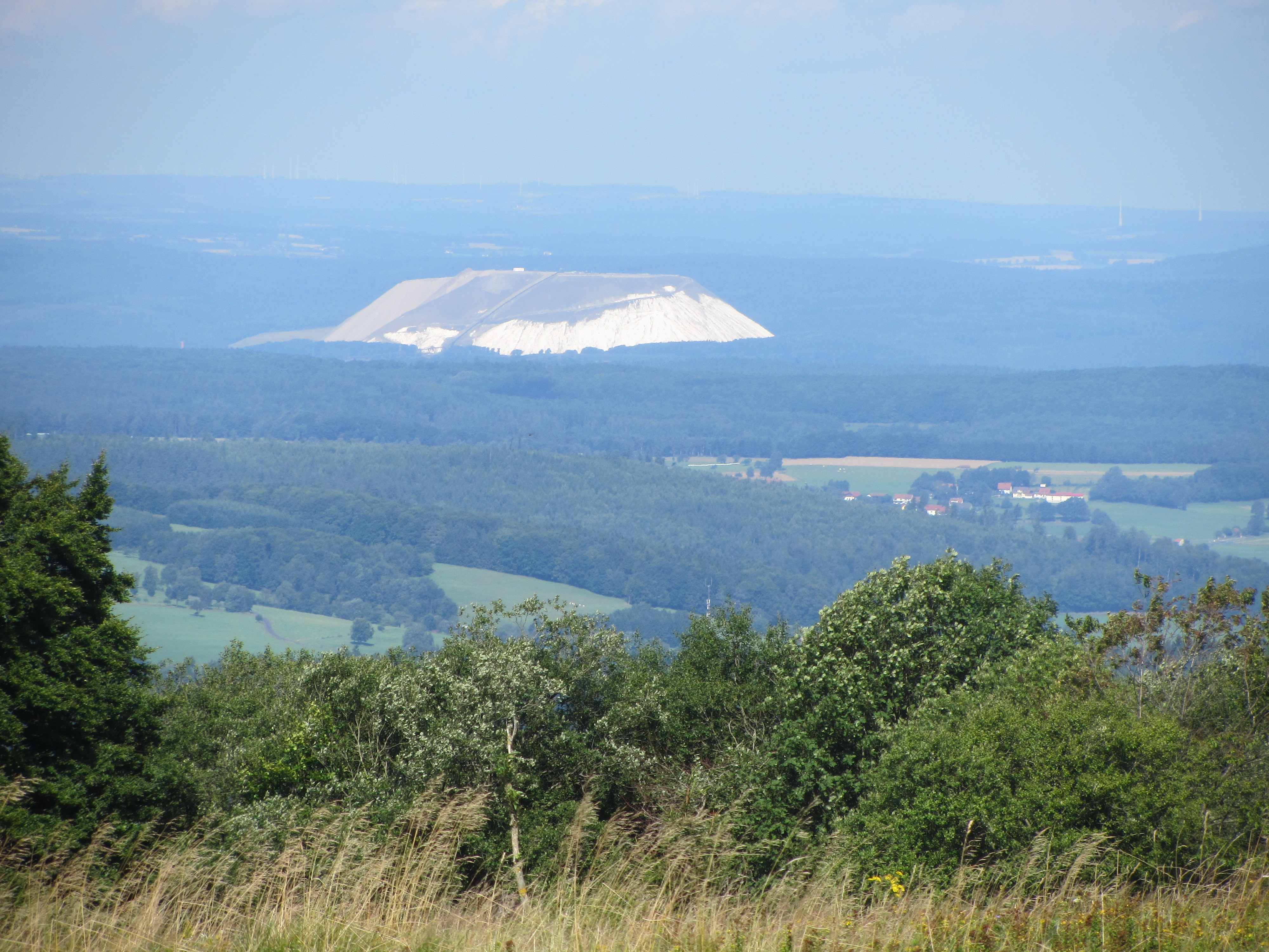 Monte Kali von Neuhof bei Fulda